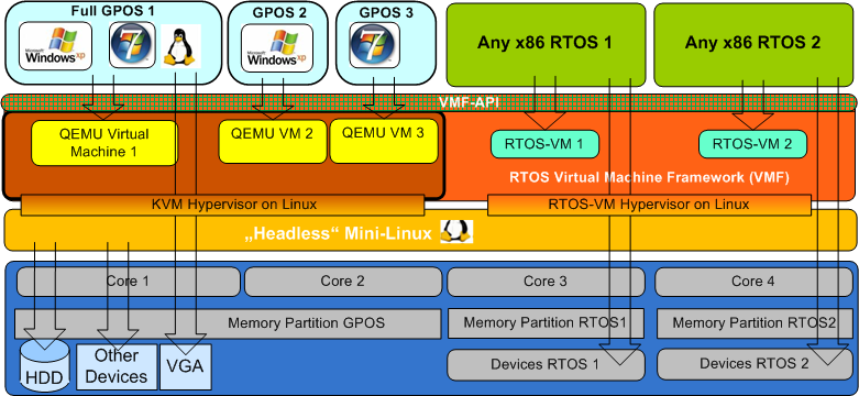 RTOSVisor Overview